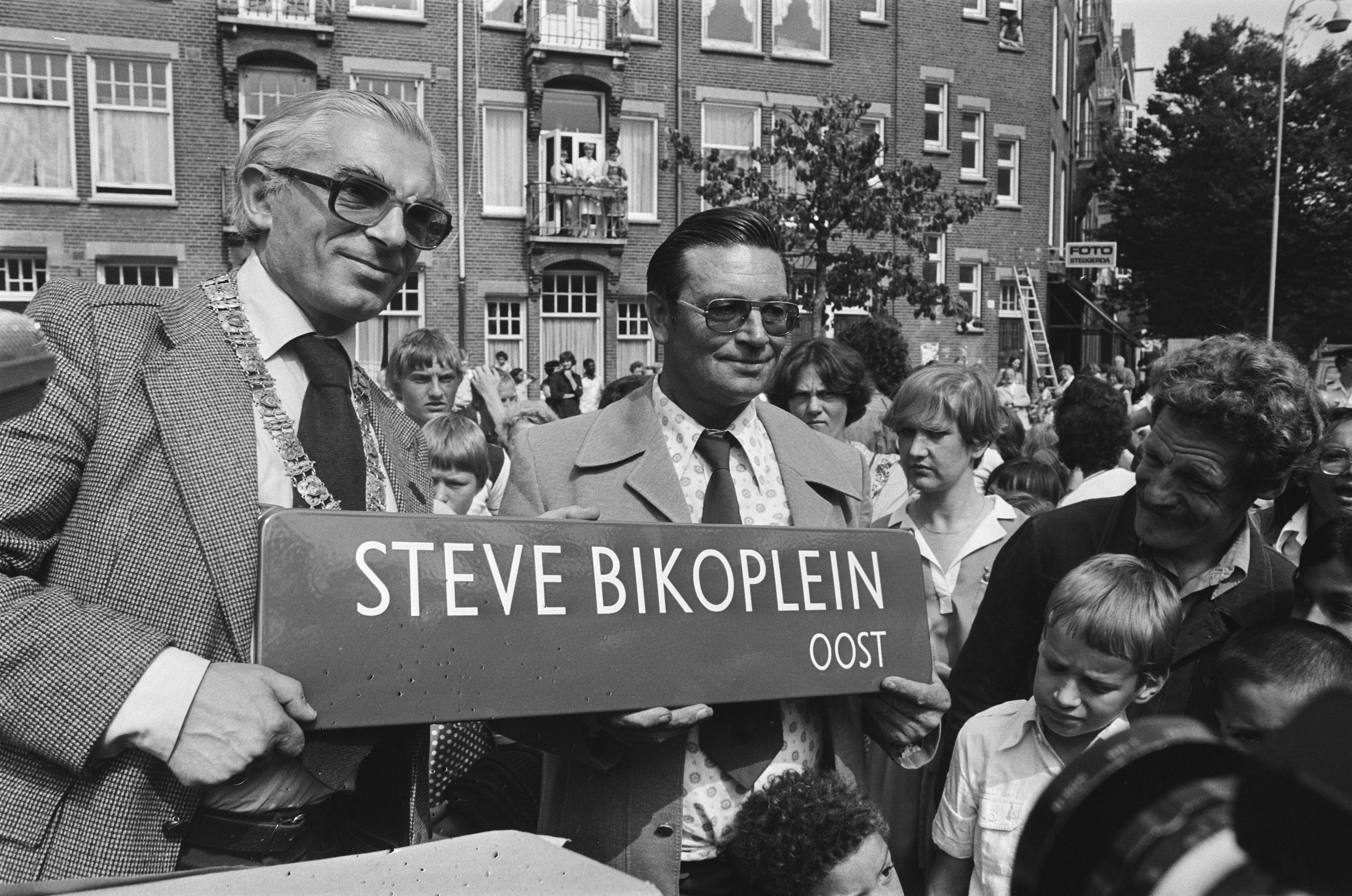 Collectie / Archief : Fotocollectie Anefo Reportage / Serie : [ onbekend ] Beschrijving : Pretoriusplein in Amsterdam omgedoopt tot Steve Bikoplei (t.n.g. gedode Zuidafrikaanse vrijheidsstrijder); bord wordt aangebracht Datum : 21 augustus 1978 Locatie : Amsterdam, Noord-Holland Trefwoorden : straatnaamborden Fotograaf : Bogaerts, Rob / Anefo Auteursrechthebbende : Nationaal Archief Materiaalsoort : Negatief (zwart/wit) Nummer archiefinventaris : bekijk toegang 2.24.01.05 Bestanddeelnummer : 929-8663